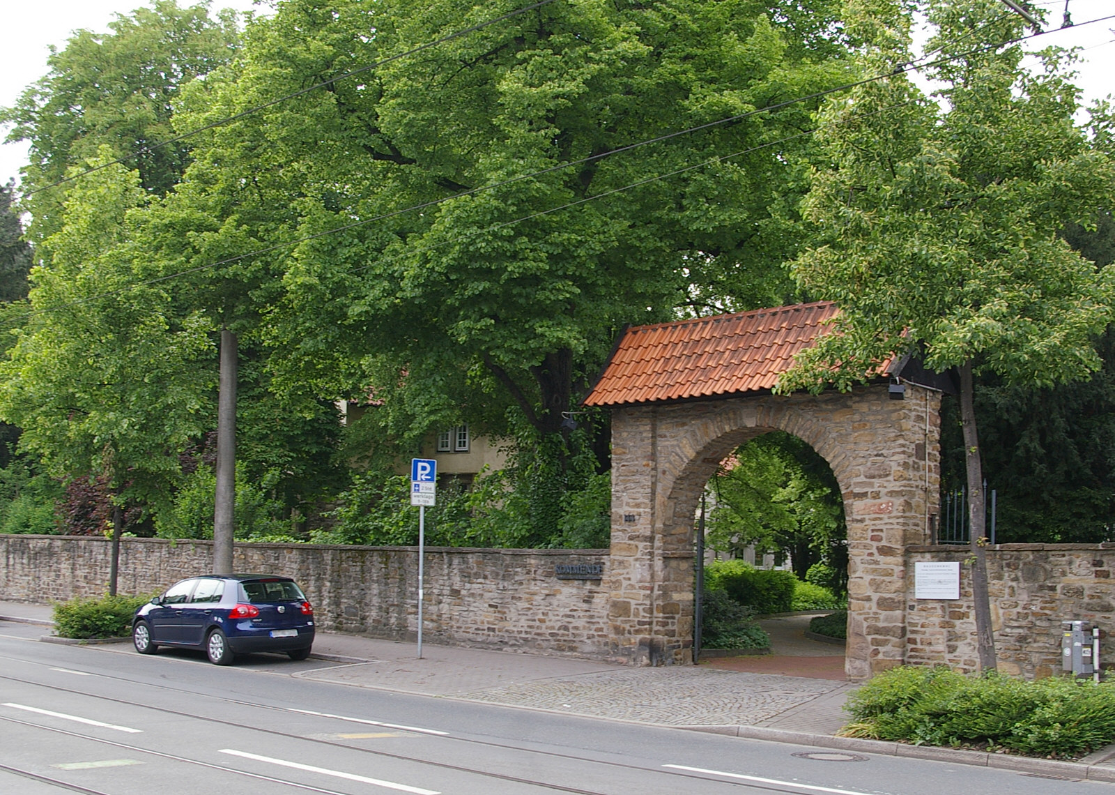 Eingangsbereich Kommende Brackel, Dortmund. Nordrhein-WestfalenThis is a photograph of an architectural monument. 0301